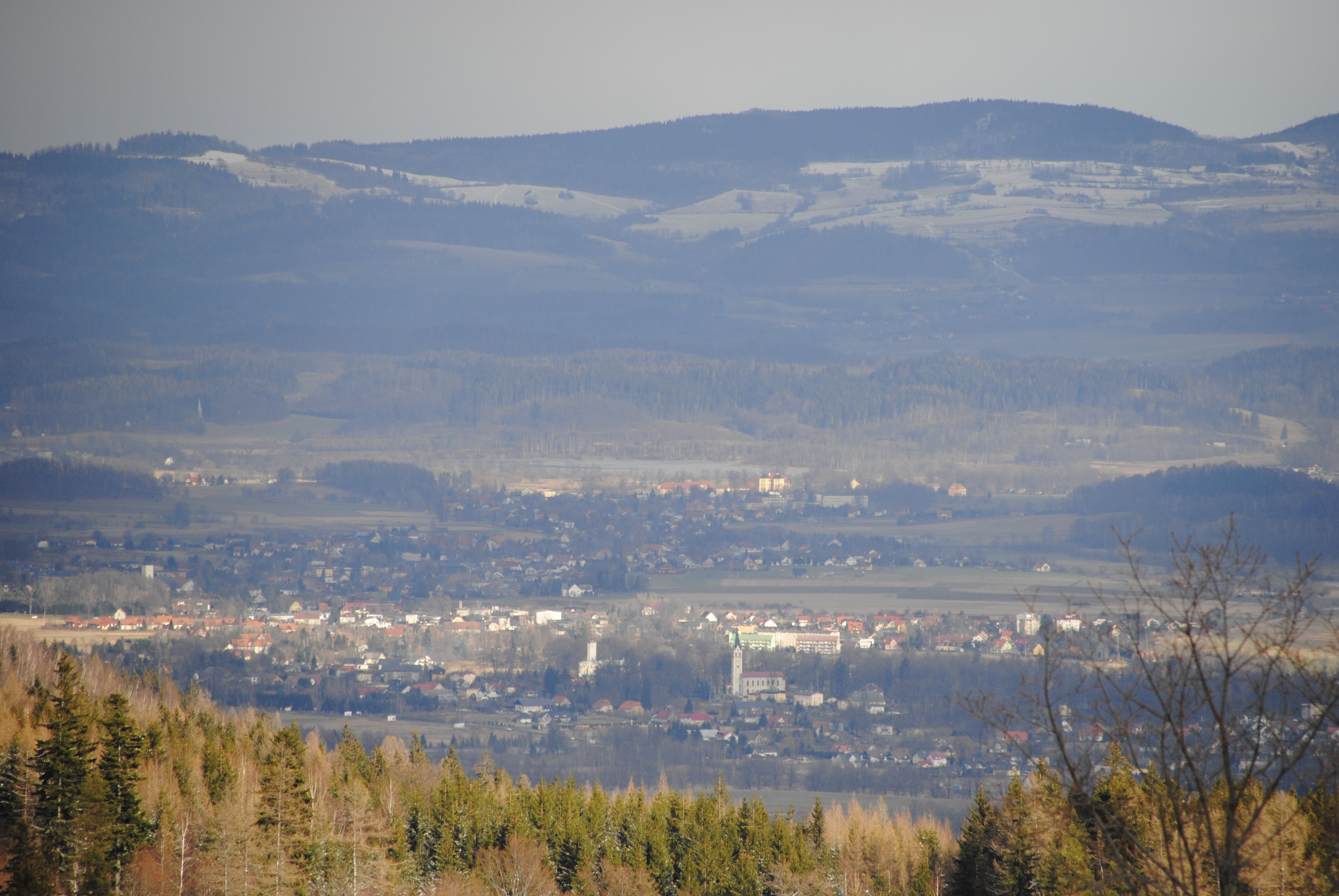 Blick von der Kirche Wang in Karpacz (dt. Krummhübel) in Richtung Norden über Erdmannsdorf-Zillertal und Lomitz